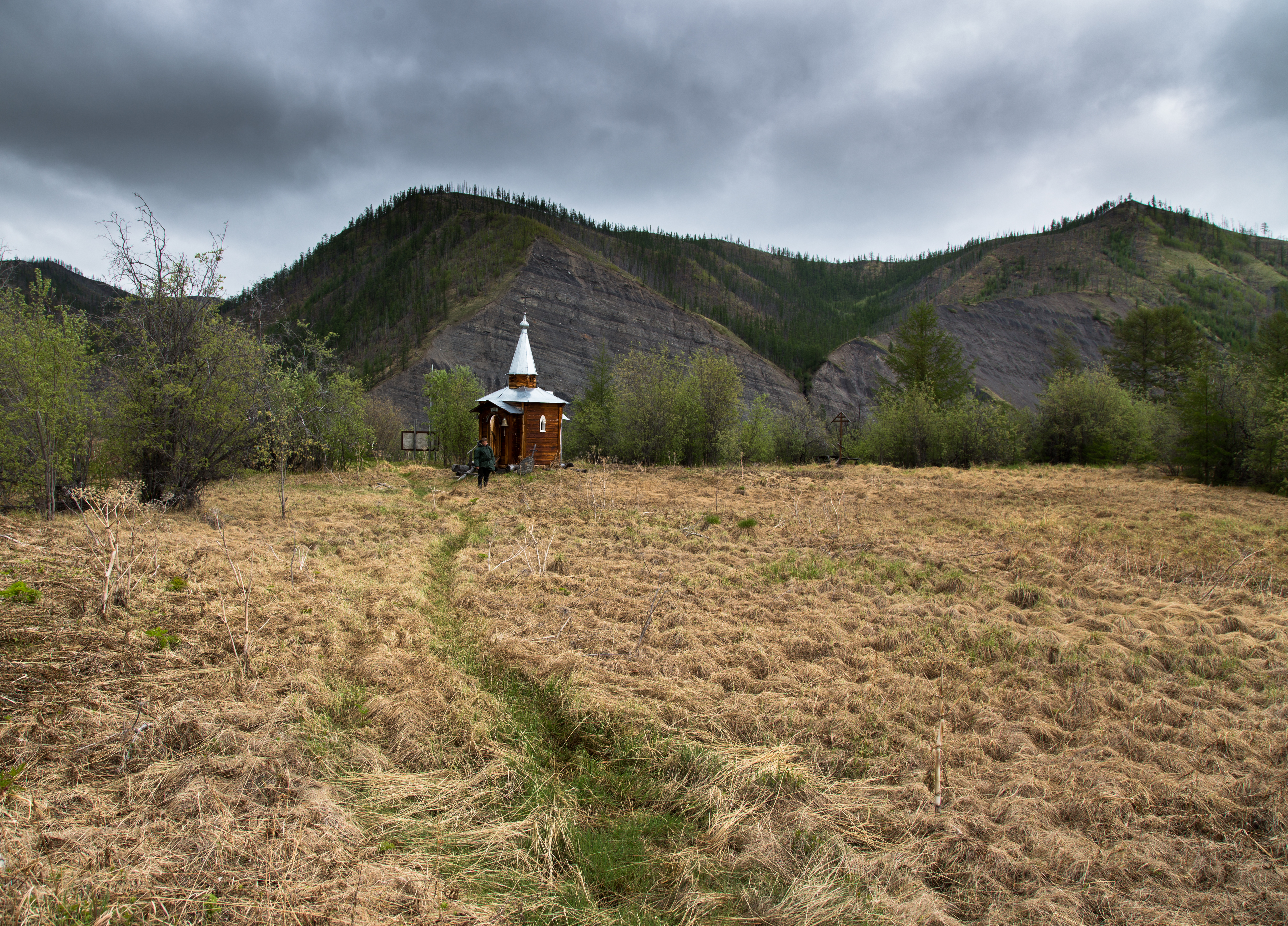 Зашиверск: Абыйский район, Якутия (Саха) This image is related to the protected area of Russia number 1420010